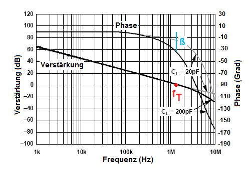 Verstärkung und Phasenverschiebung eines OP ohne Rückkopplung